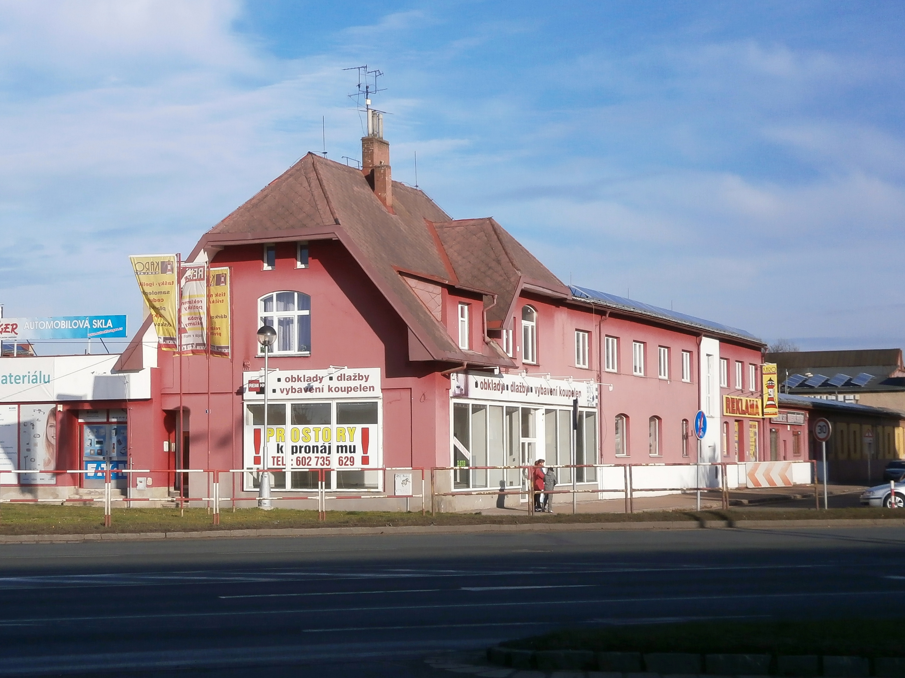 Vančurovo náměstí čp. 309 (Hradec Králové)